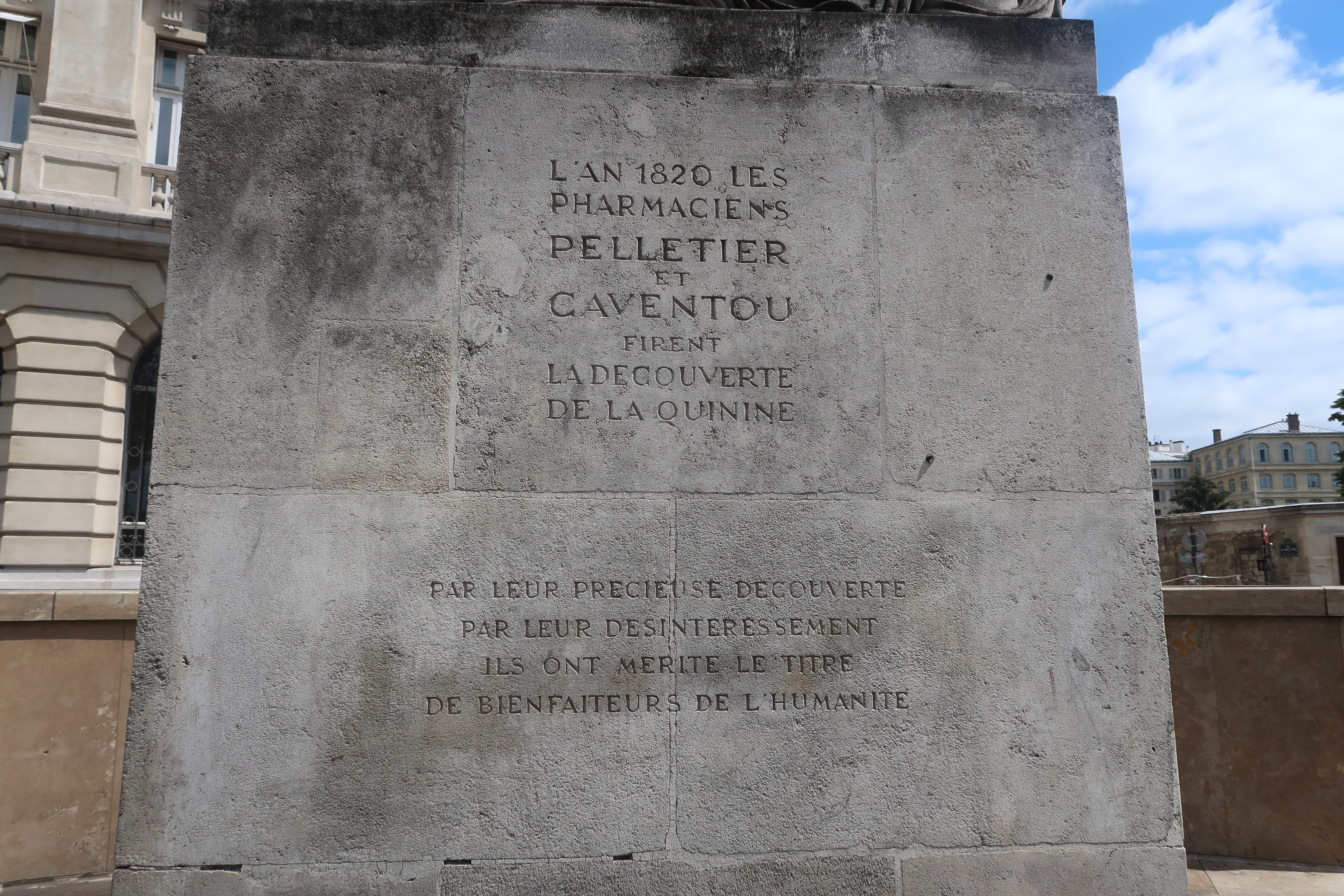 Fontaine Pelletier et Caventou, place Louis-Marin, 105 boulevard Saint-Michel (Paris, 5e).